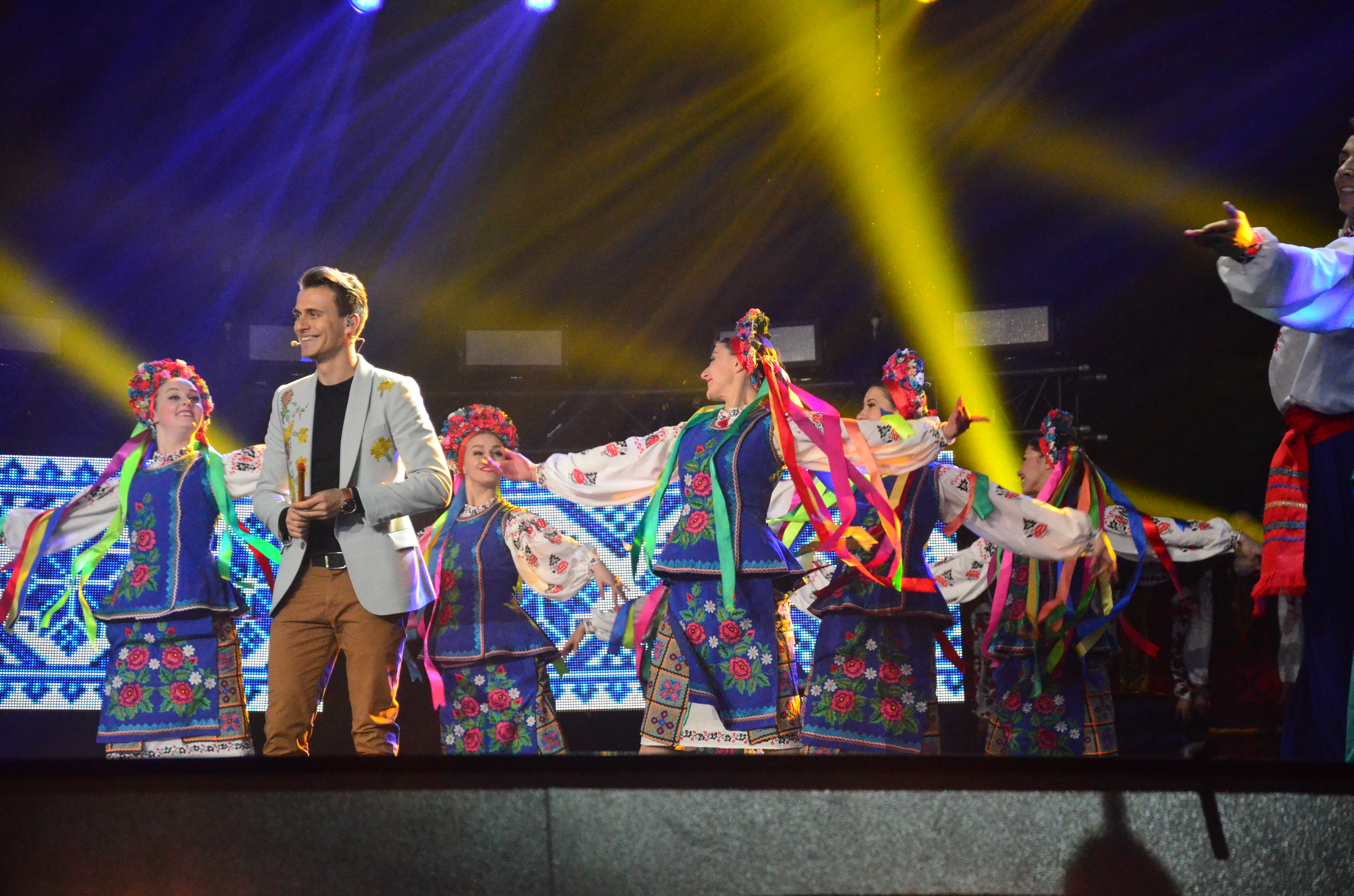 10 травня 2017 року у Києві відбулась генеральна репетиція 2 півфіналу "Євробачення".